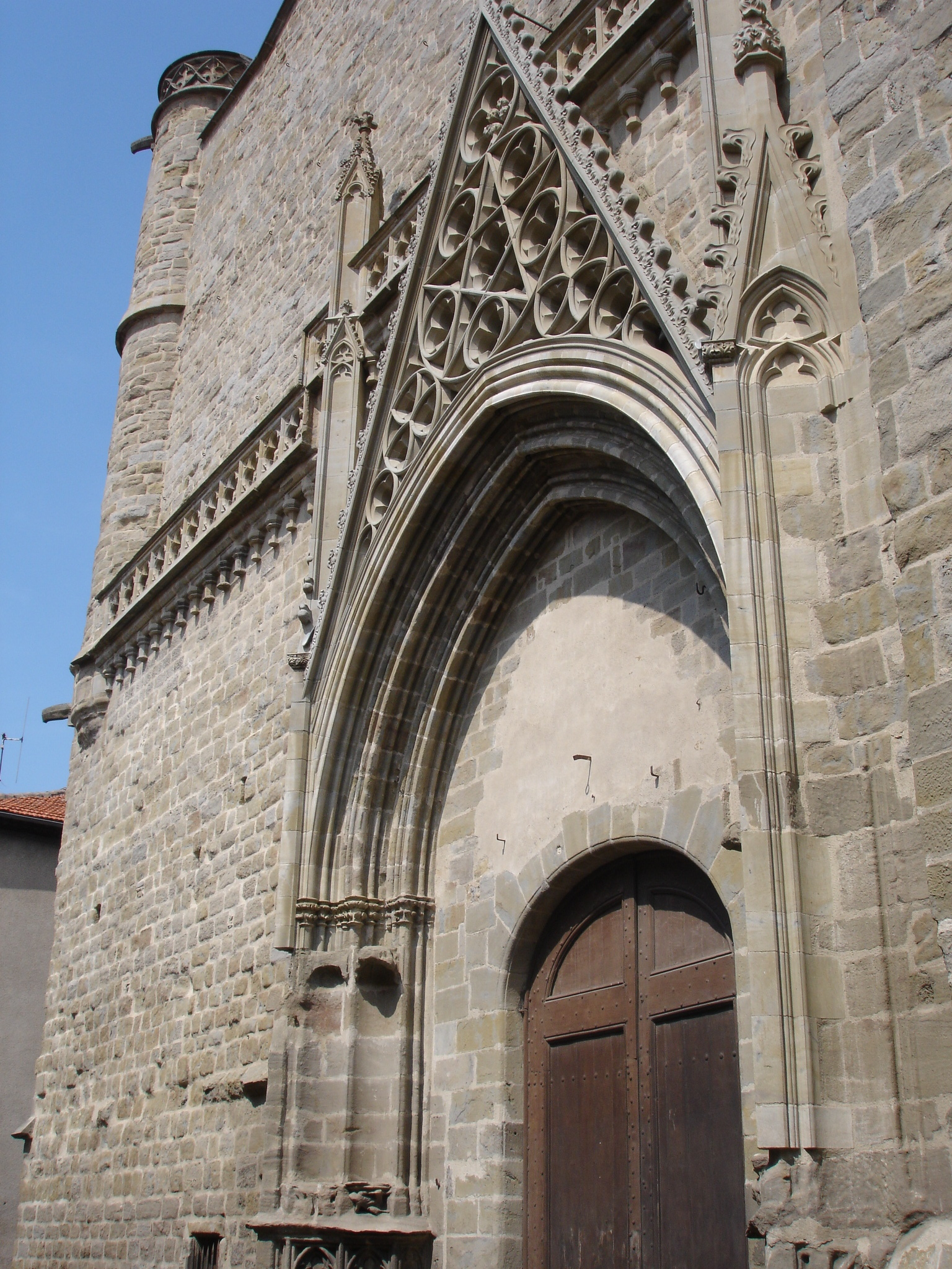 france, Aude (11), Carcassonne, porte de l'église Saint-Vincent